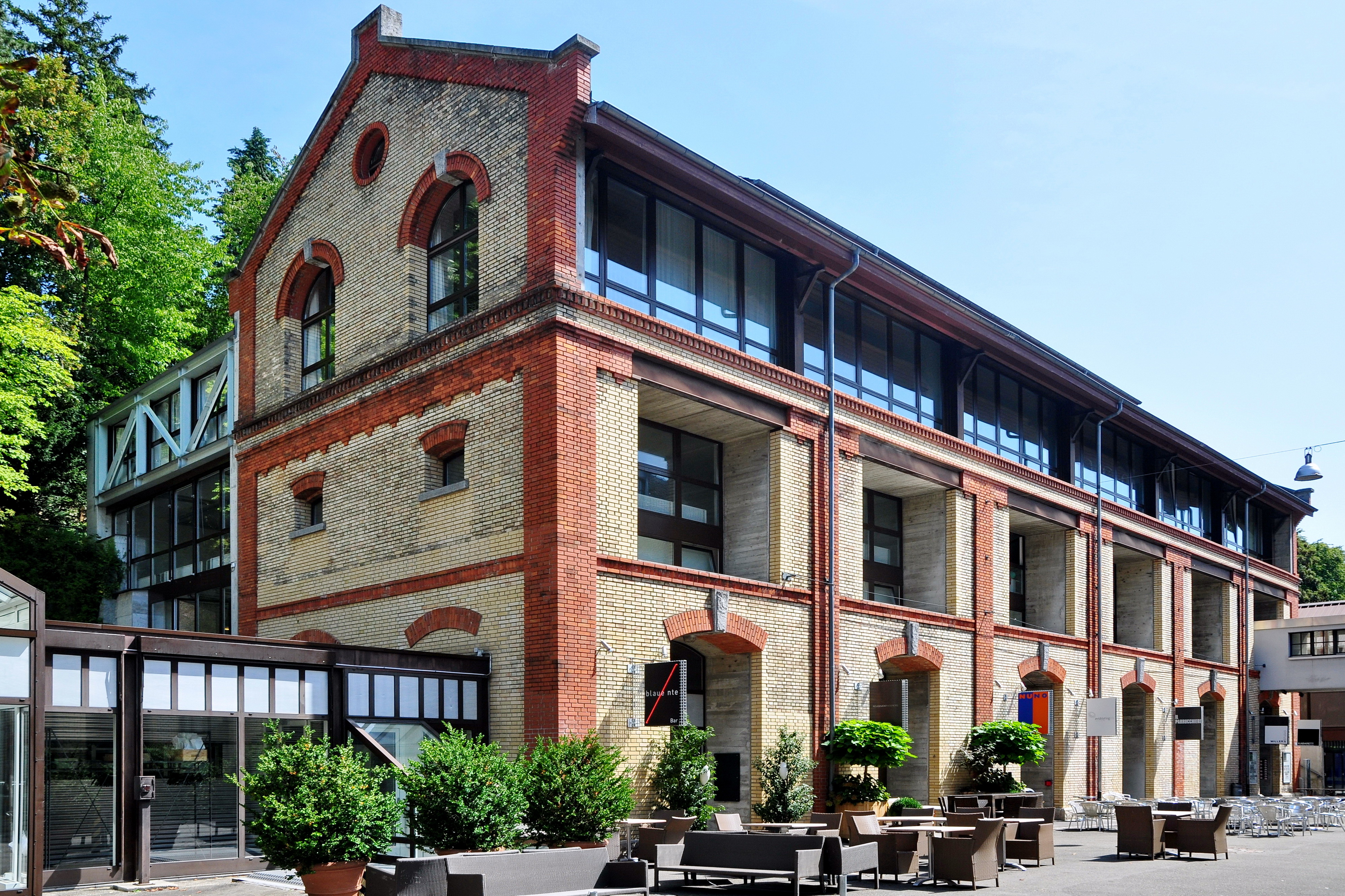 Mühle Tiefenbrunnen in Zürich-Seefeld (Switzerland)